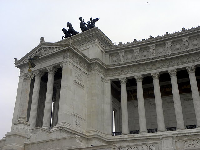 Roma